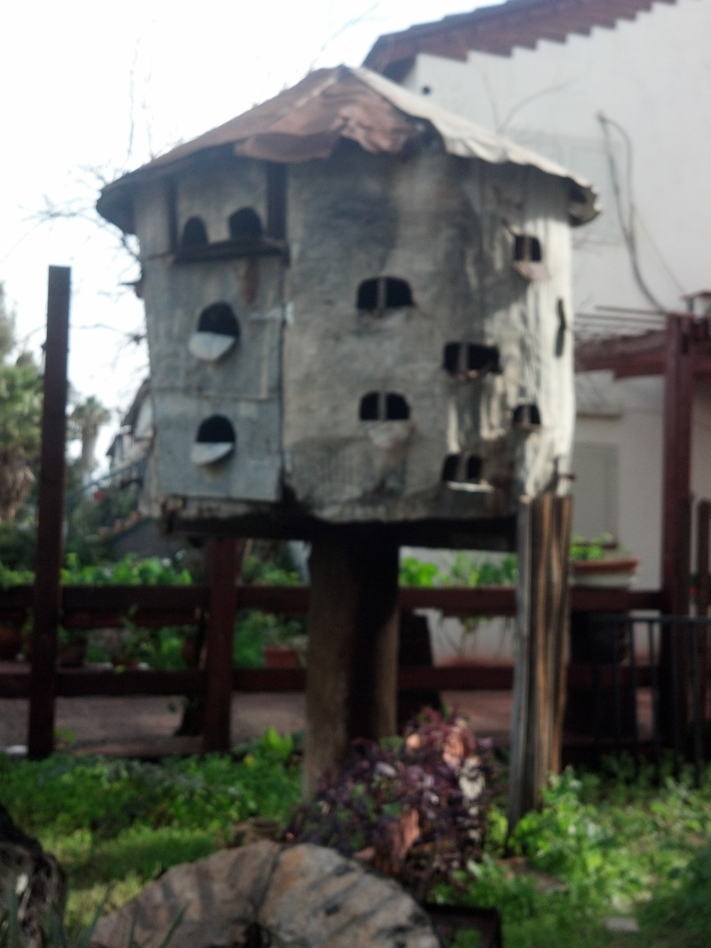 שובך יונים עשוי פח במזכרת בתיה